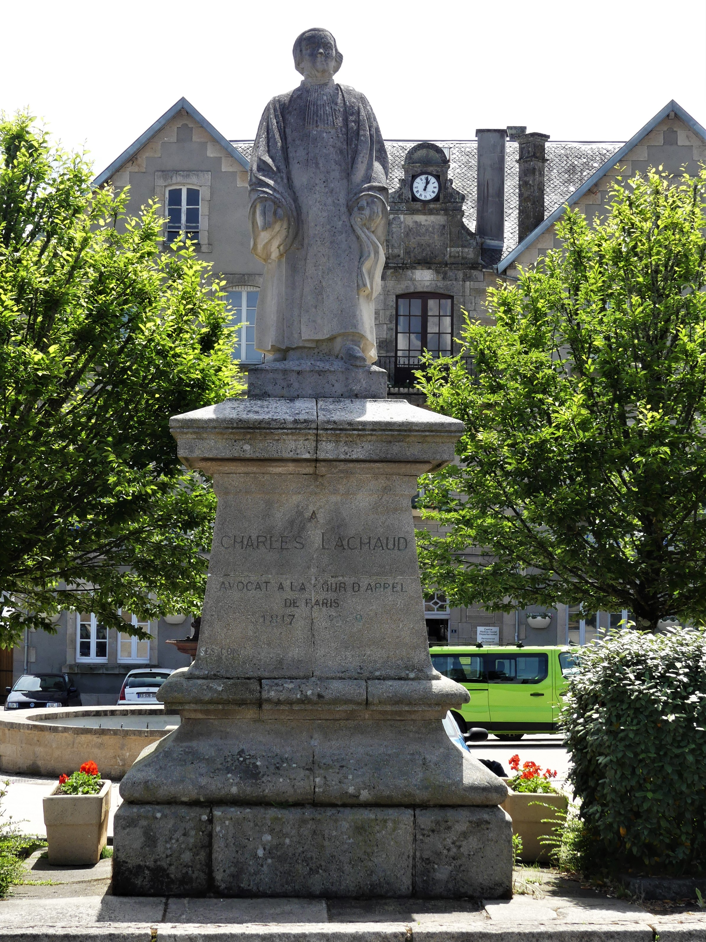 La statue de Charles Lachaud à Treignac, Corrèze, France.